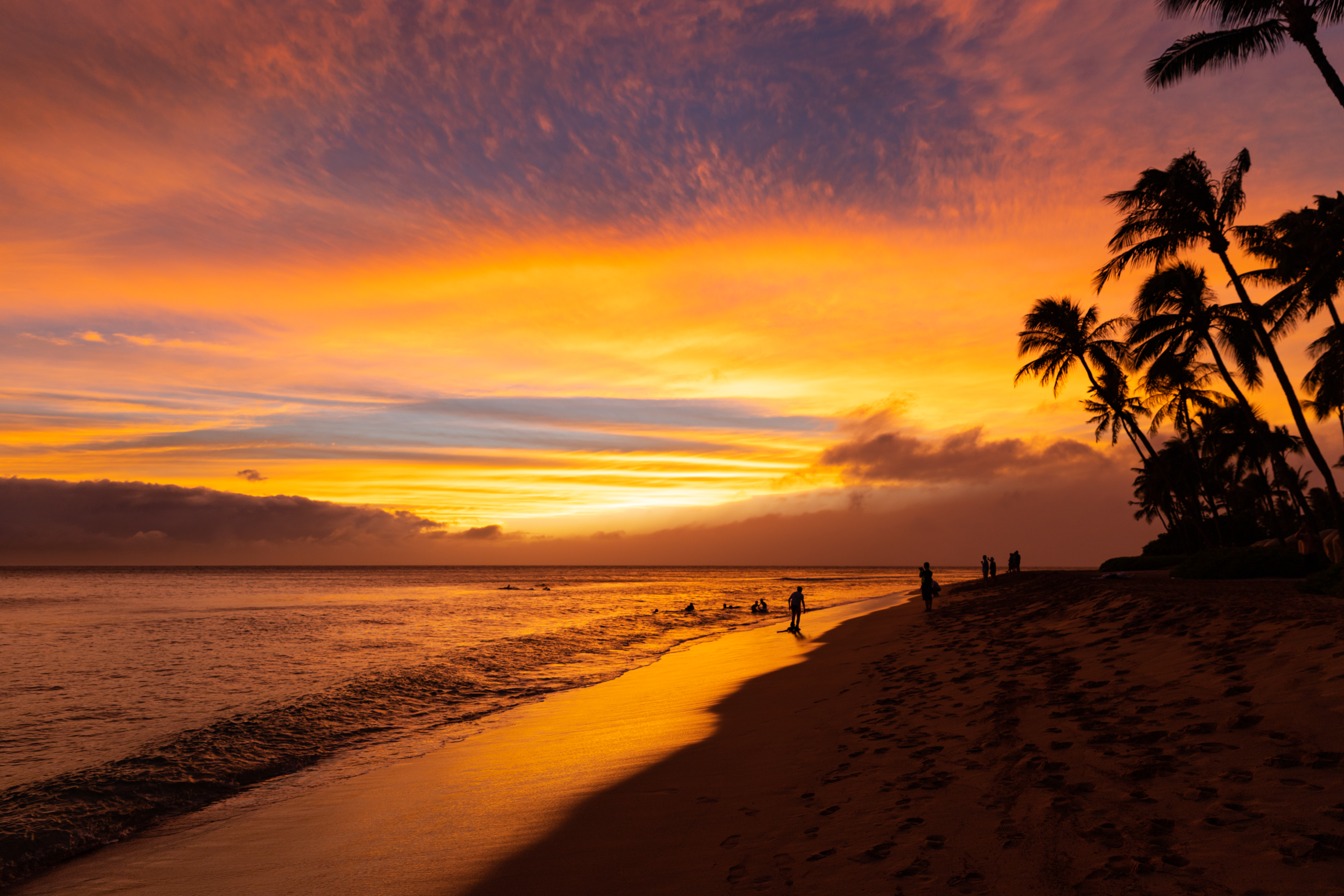 Kaanapali beach sunset on Maui Hawaii